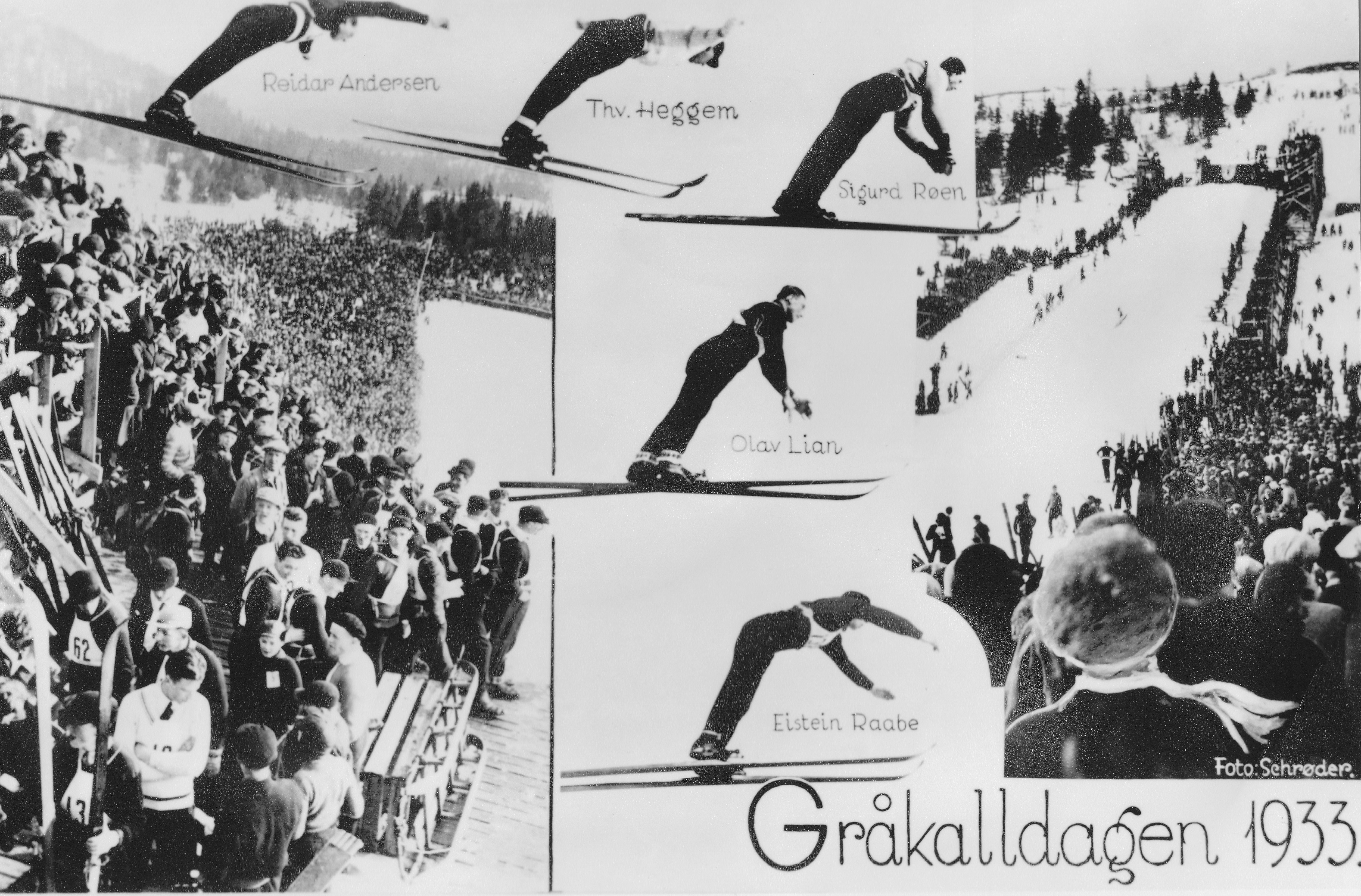 1933 Fotopositiv (Postkort). Gråkalldagen, Trondheim, 1933. På bildet skihopperne Reidar Andersen (1911 - 1991), Thorvald Heggem, Sigurd Røen (1909 - 1992), Olav Lian (1906 - 2000) og Eistein Raabe (1908 -).